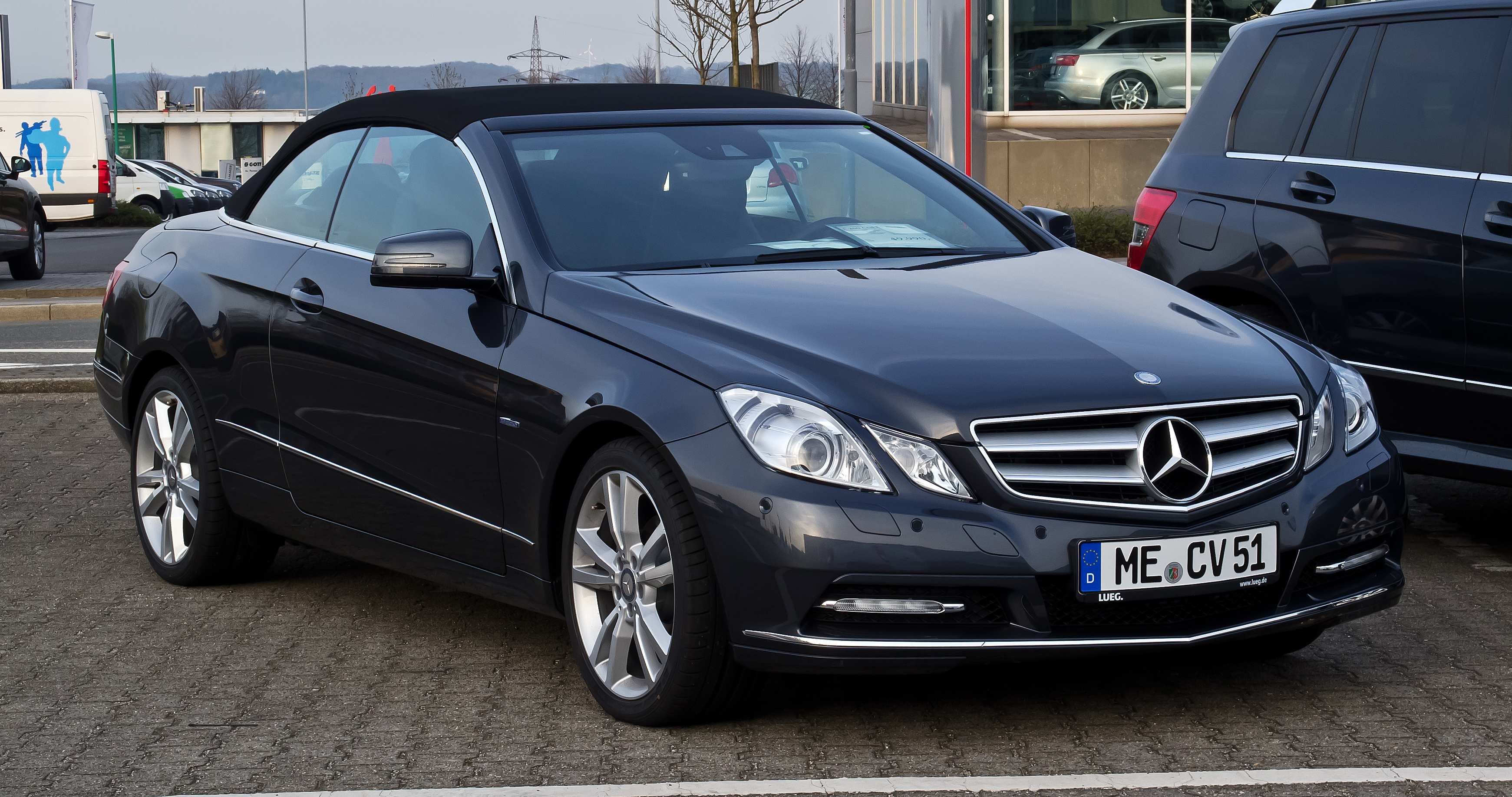 Mercedes-Benz E 200 BlueEFFICIENCY Cabriolet (A 207)